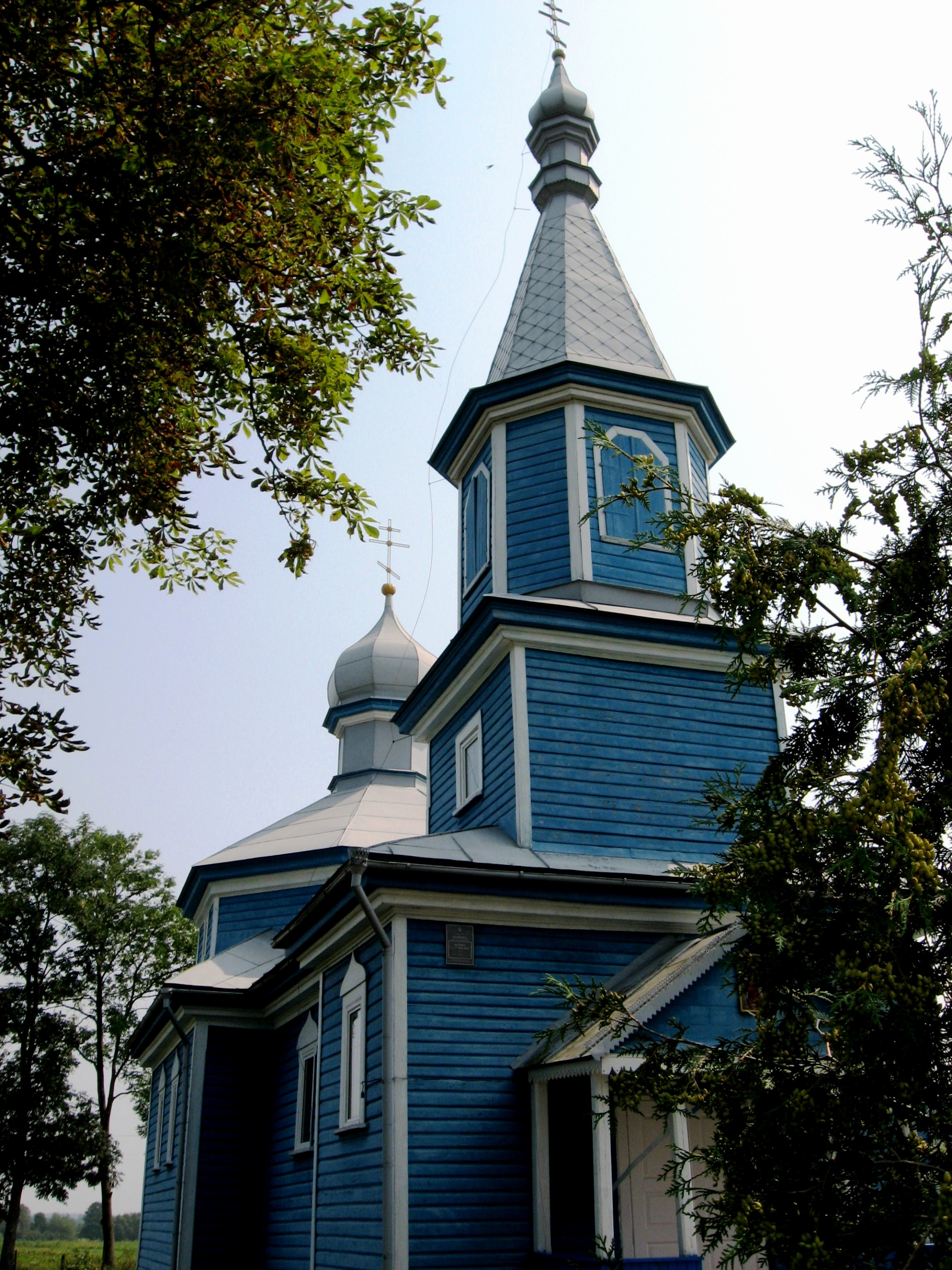 Карасин. Свято-Михайлівська церква, 1691 р.